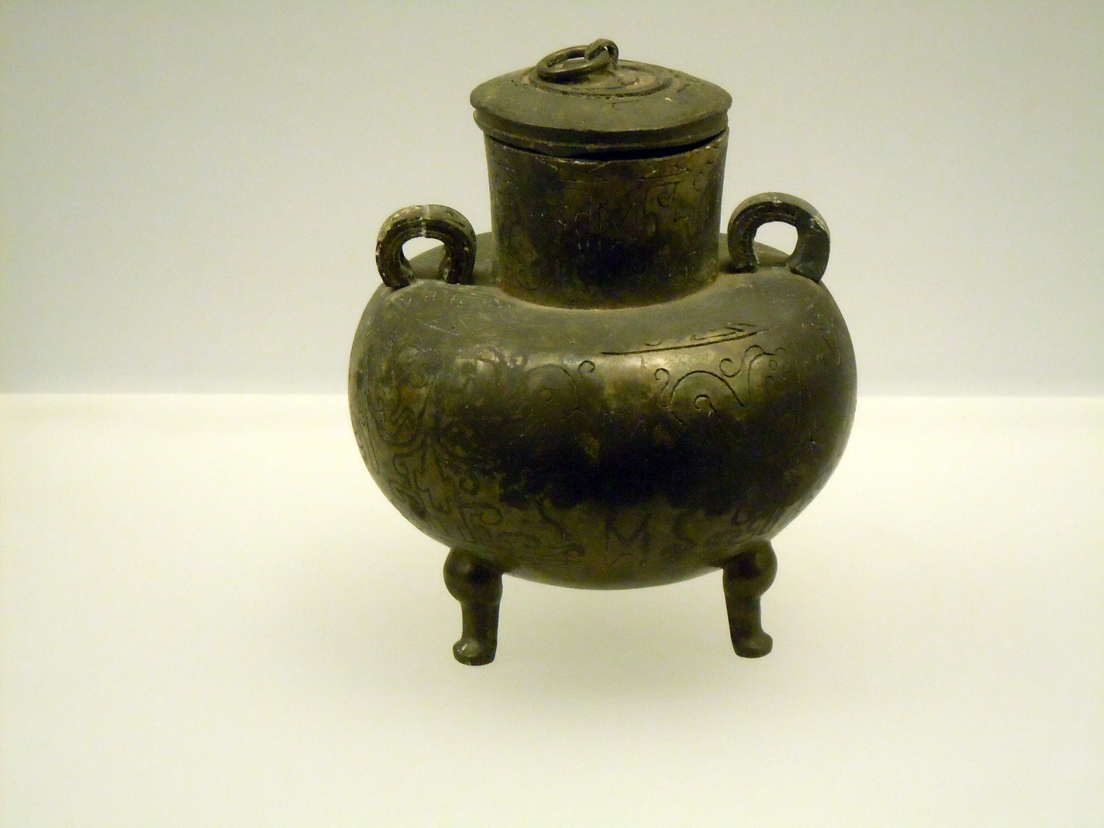 出土于河南省固始县侯古堆一号墓的龙纹三足带盖铜壶